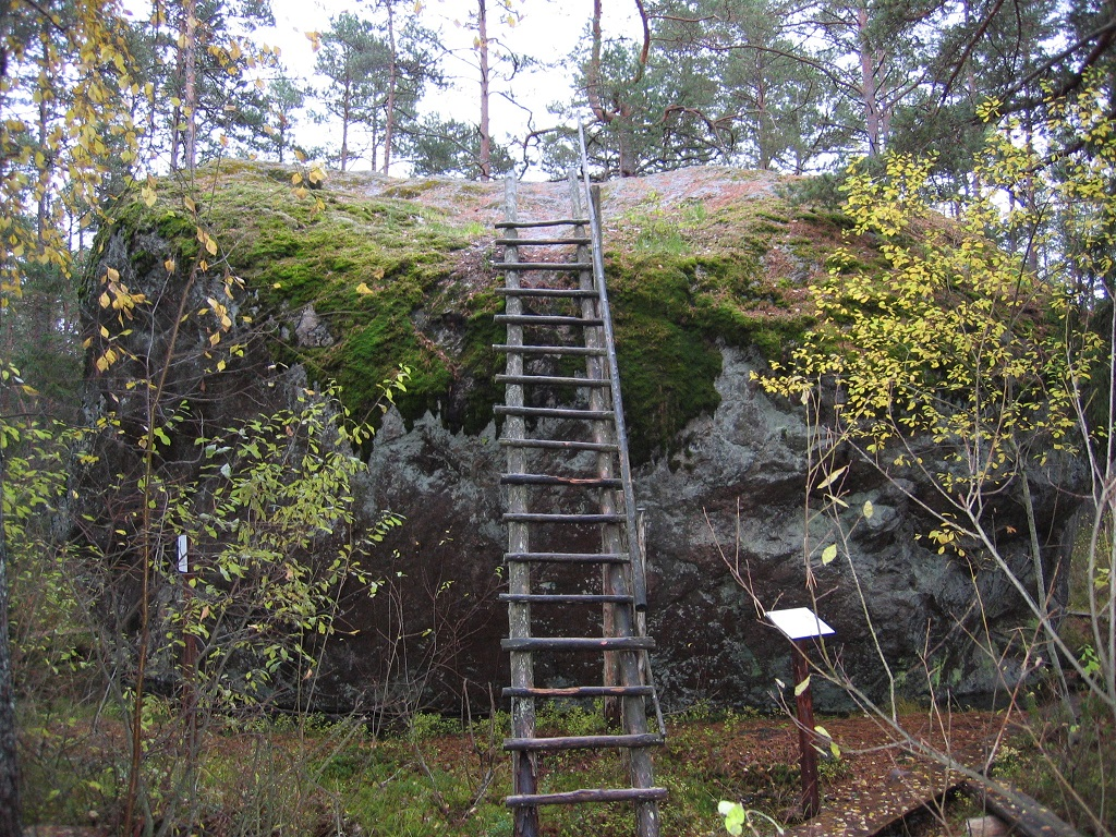 Redel Majakivile